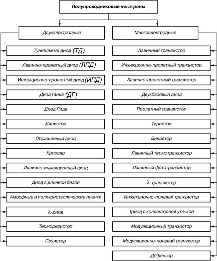 Рис. 4 – Классификация полупроводниковых негатронов